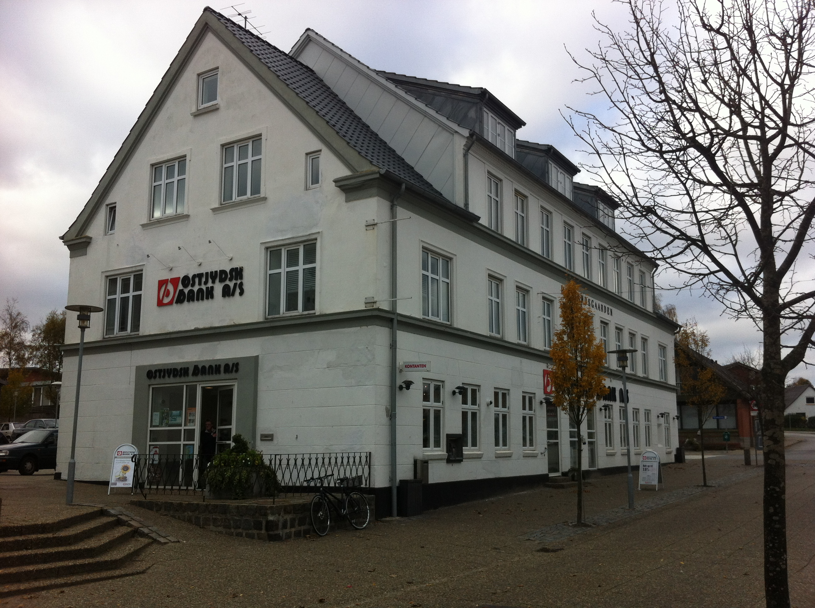 Købmandsgaarden for enden af Storegade